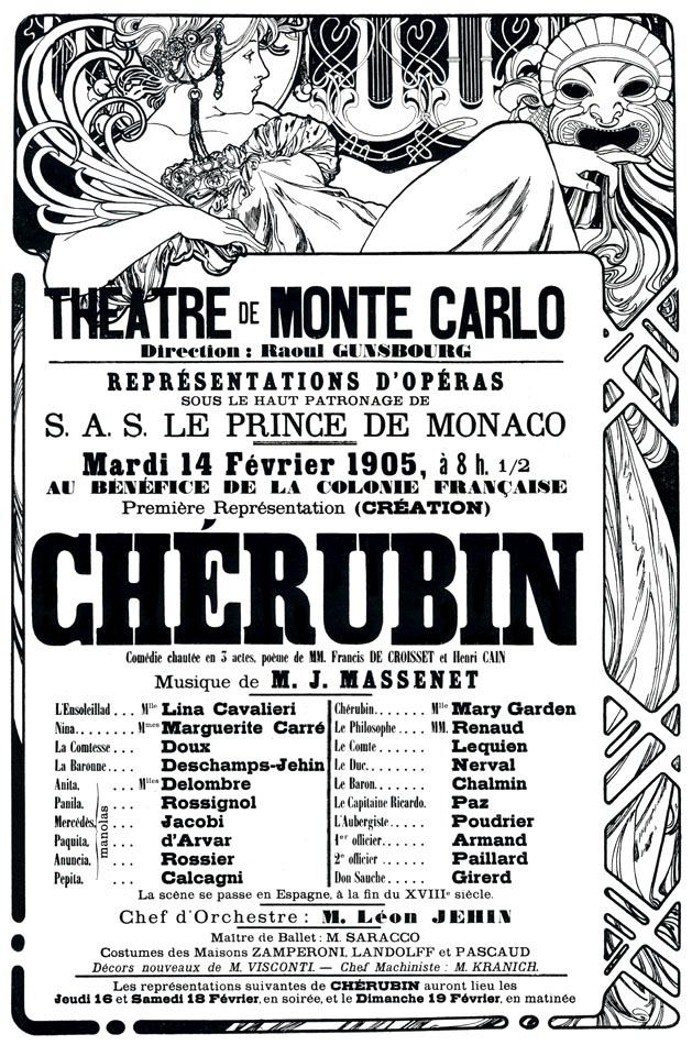 Cartell de l'estrena de Chérubin a Montecarlo del 14 de febrer de 1905